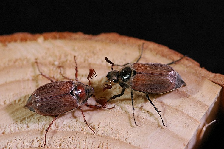 Melolontha hippocastani, 2 males, colour variation